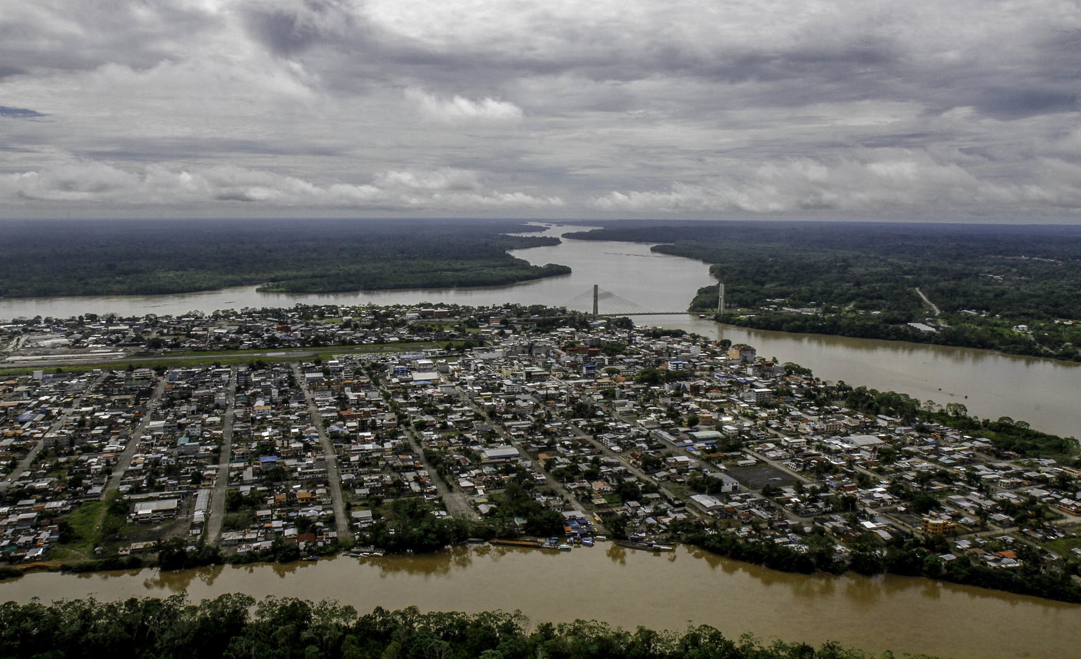 Coca, 21 de mayo (Andes).- Por medio del Ministerio del Ambiente se realizó una visita al Parque Nacional Yasuní para constatar que se cumplan las licencias técnicas y ecológicas en la construción de las plataformas petroleras en el bloque 31. Además de varias actividades que realizó Lorena Tapia, ministra de esta cartera de estado. ANDES/Micaela Ayala V.